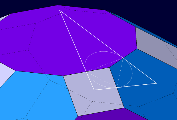 Konstruktion der Dreiecksfläche des Hexakisikosaeders am dualen Ikosidodekaederstumpf